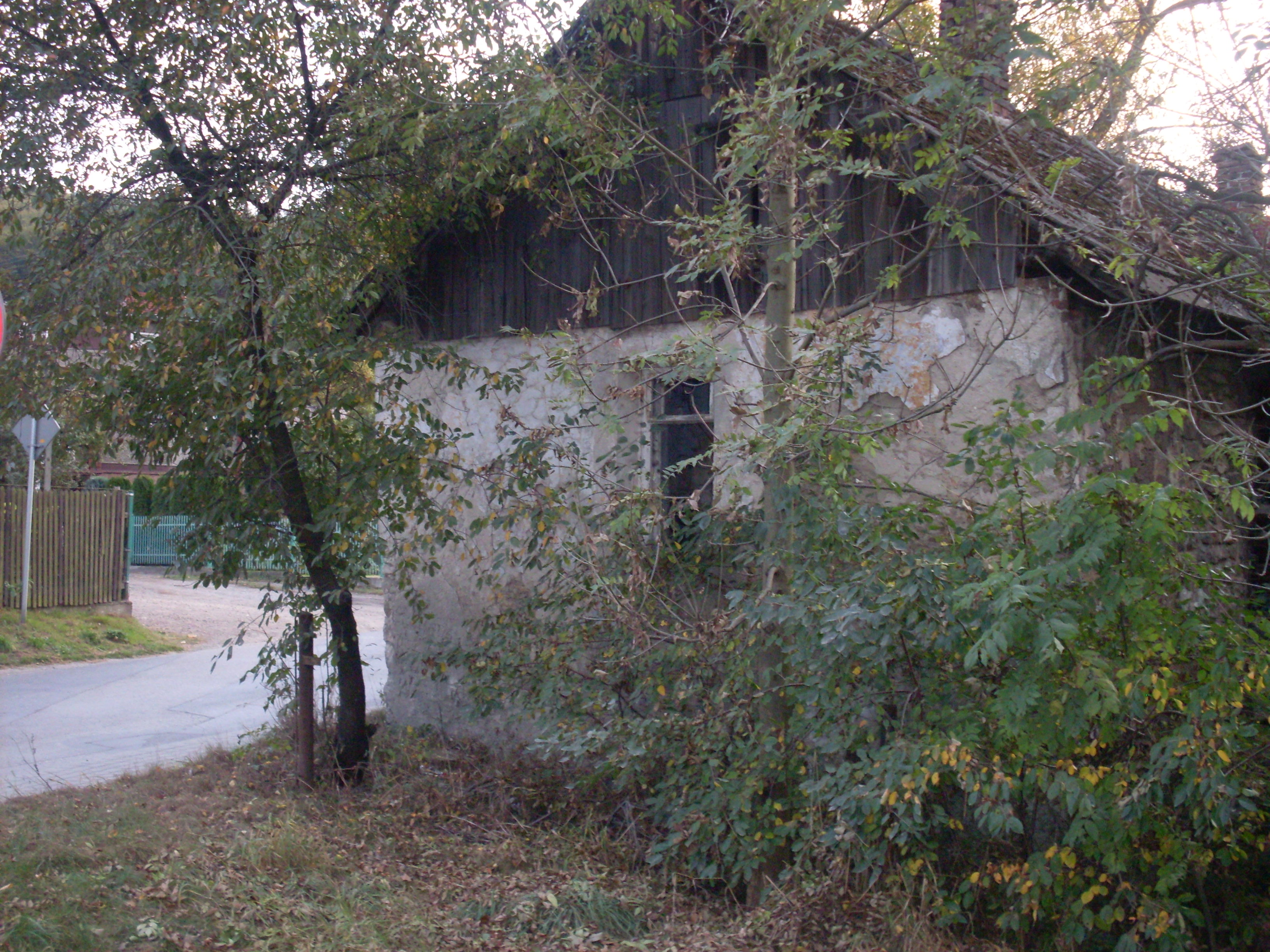 Gwoździec (ul.Leśna) Budynek na granicy Krzeszowic i Nawojowej Góry